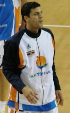 Dani Farabello-Menorca Basquet 06/07